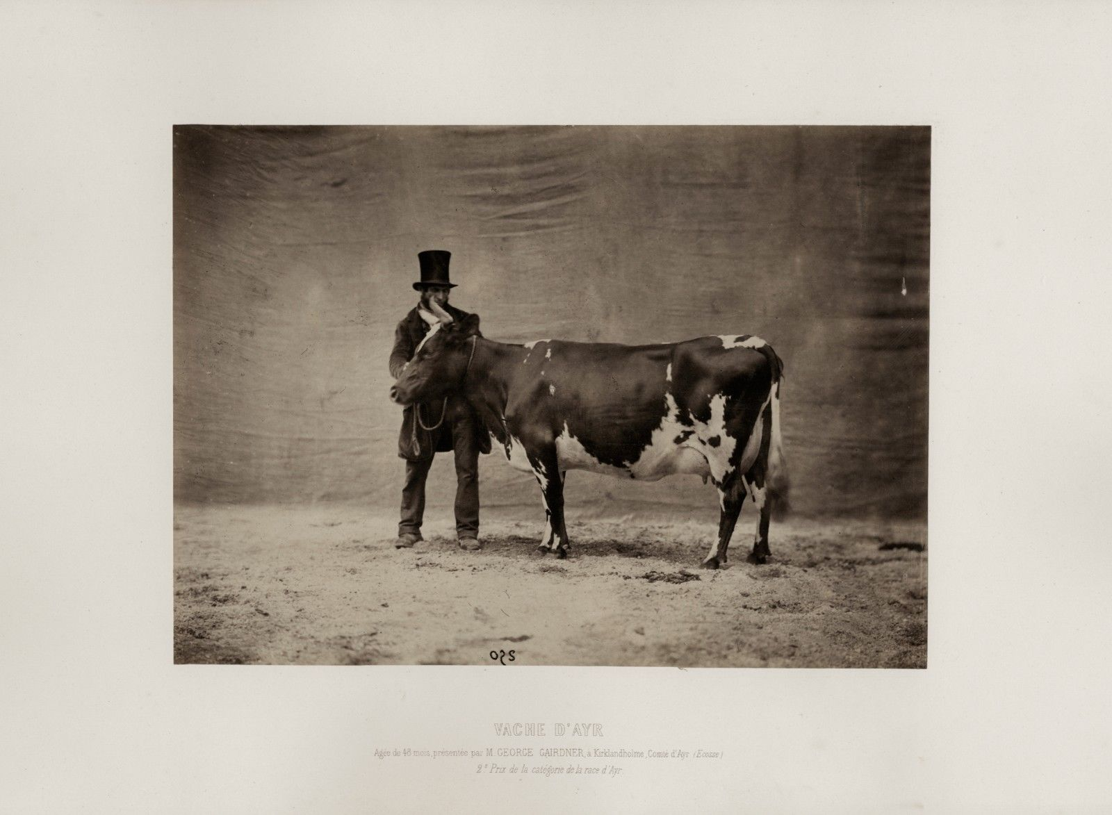 Vache D'Ayr